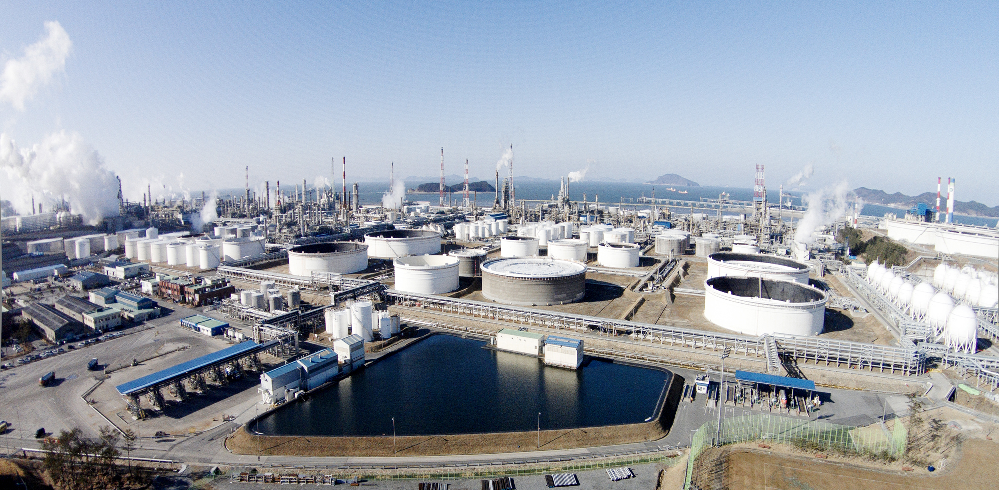 대산일반산업단지 전경